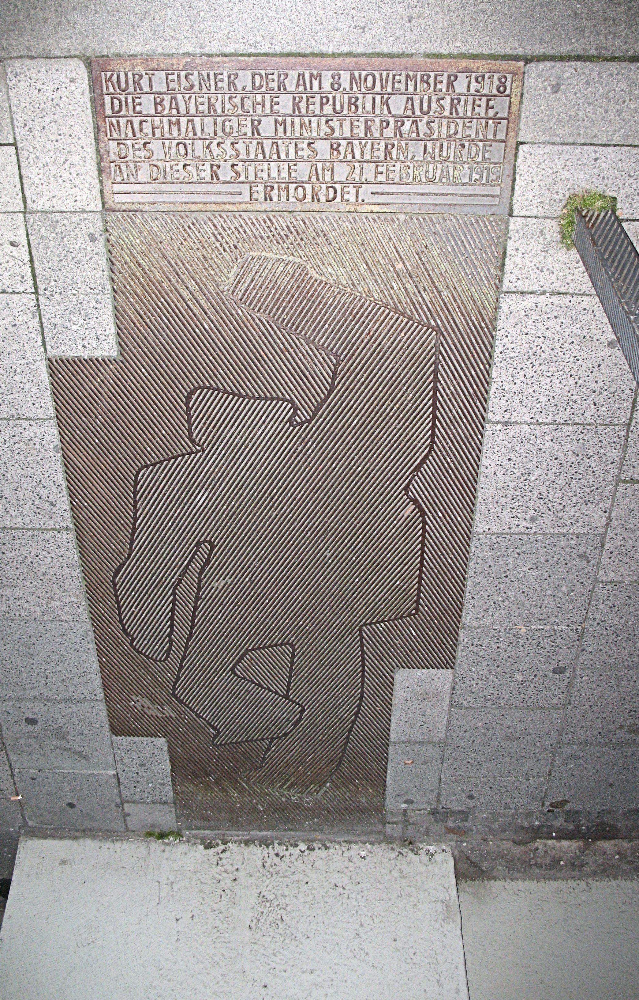 Germany, Bavaria, Munich, Kurt Eisner (1. Bayrischer Ministerpräsident) "Bodendenkmal" in der Kardinal-Faulhaber-Straße, zeigt die Umrisse des Ermordeten am Boden